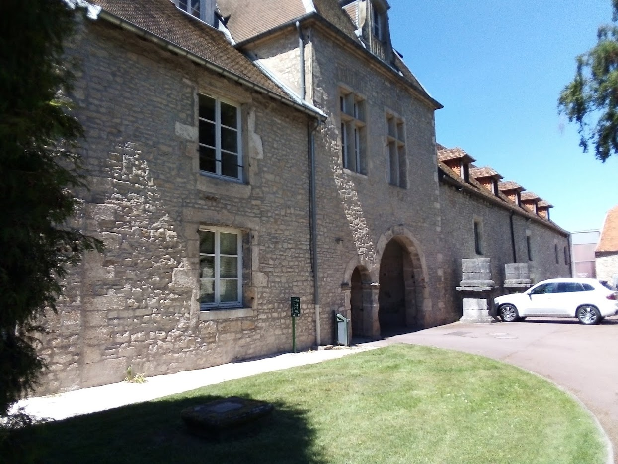 La porte-Galon à Bourbonne-les-Bains